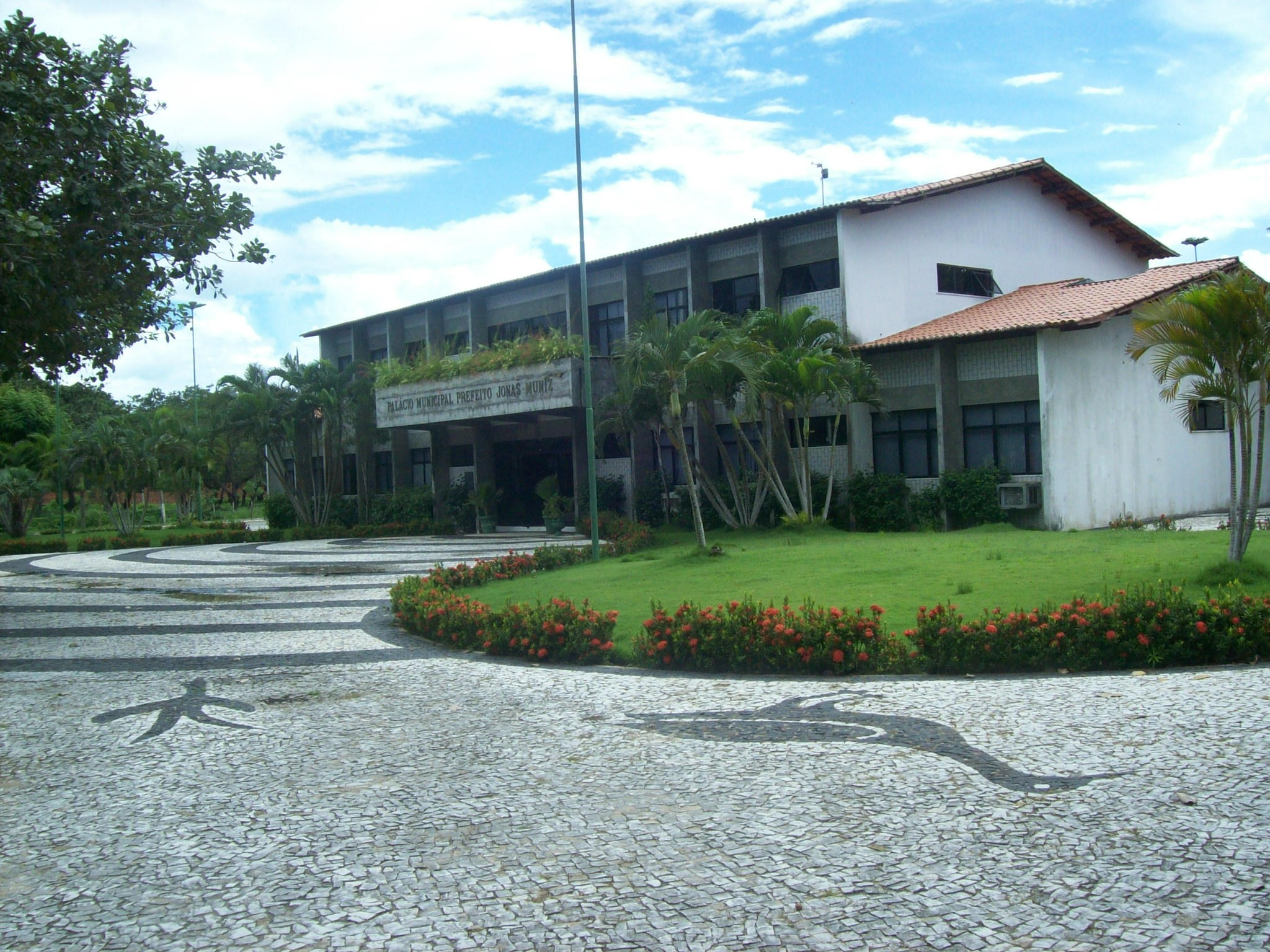 Palácio municipal prefeito Jonas Muniz (Cruz - Ce) Localizado à Avenida 14 de Janeiro. Cep:62595-000